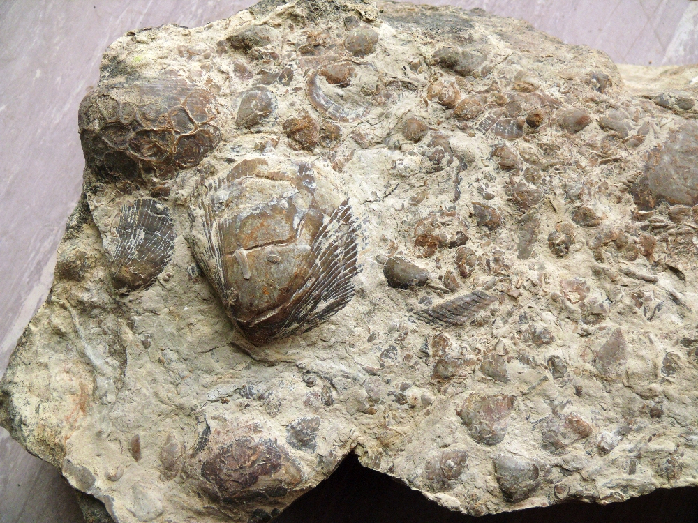 Fossilien innerhalb der Oberen Schaumkalkbank (Jena-Formation, Unterer Muschelkalk), Hohenlohe, Deutschland